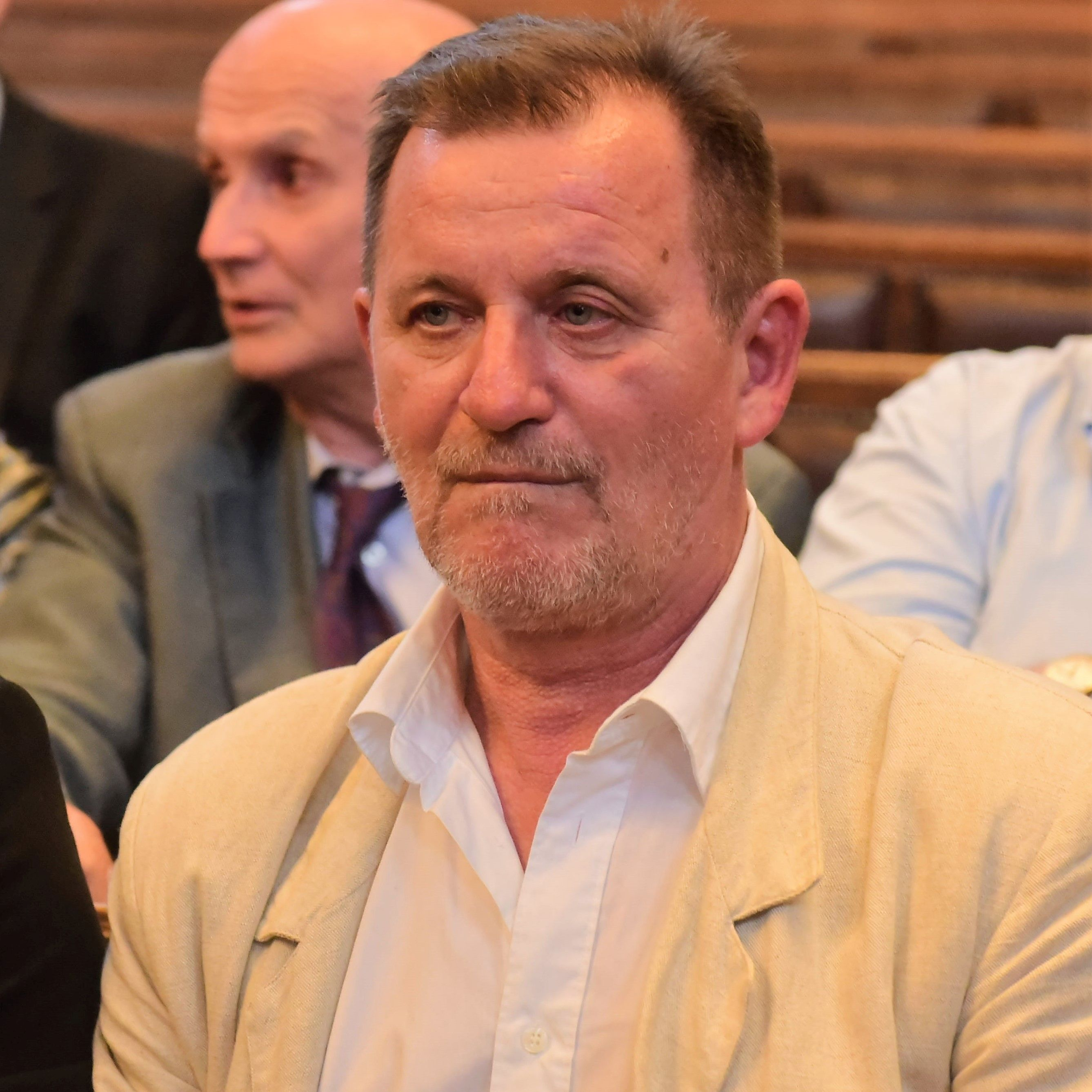 Takács János világbajnok magyar asztaliteniszező